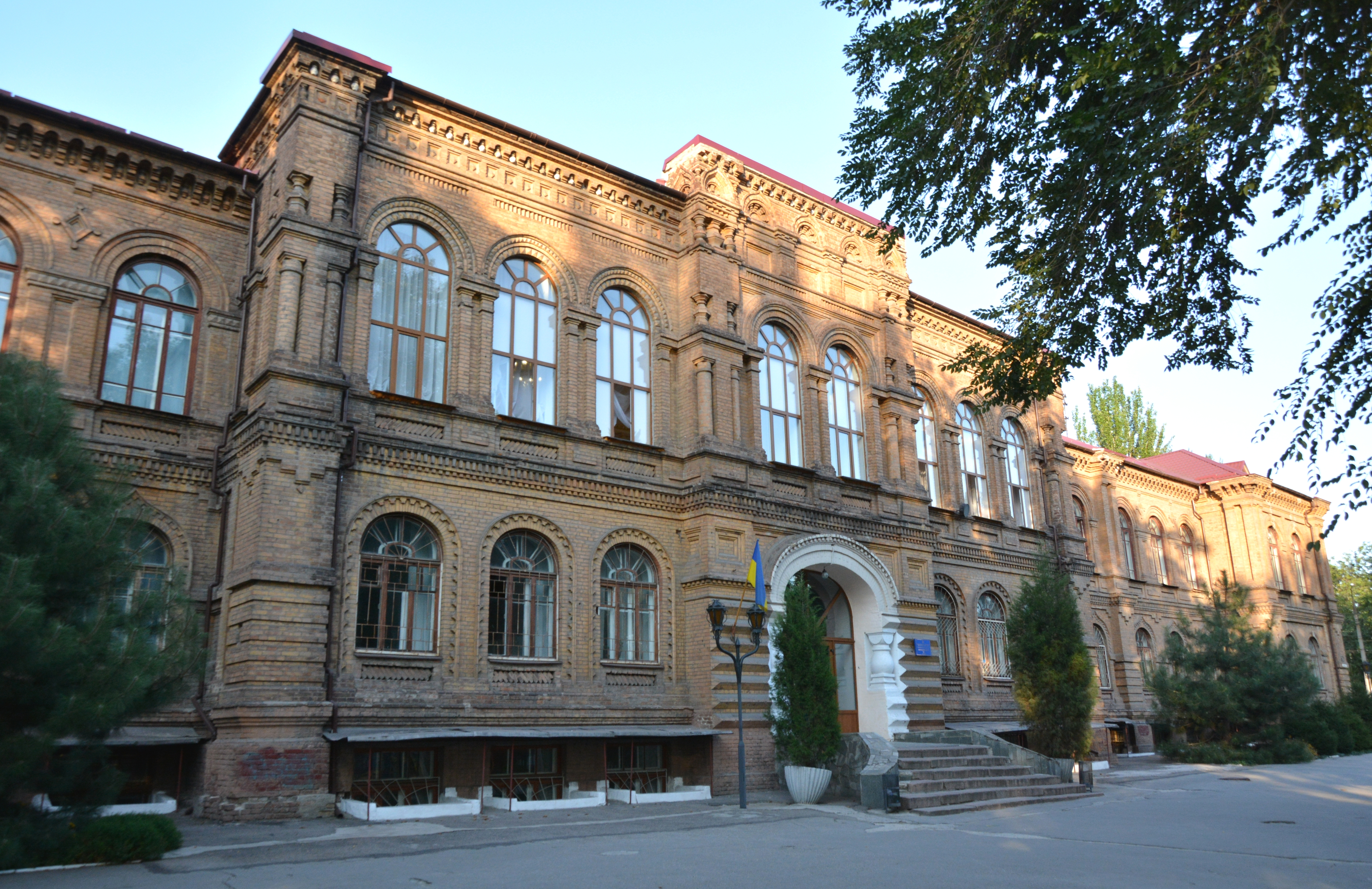 Будинок жіночої гімназії, Запоріжжя, вул. Гоголя, 62/31